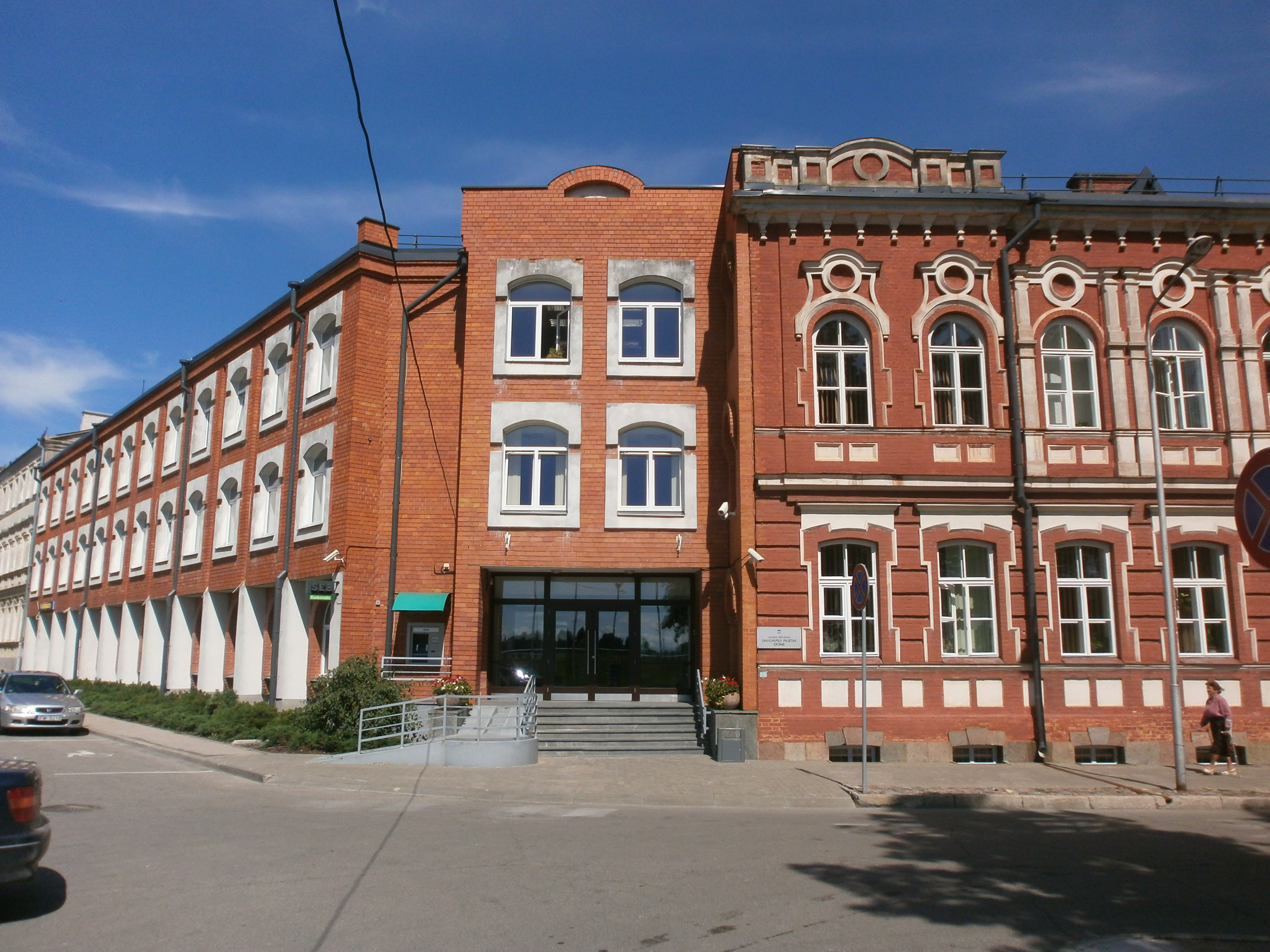 Daugavpils pilsētas domes ēka